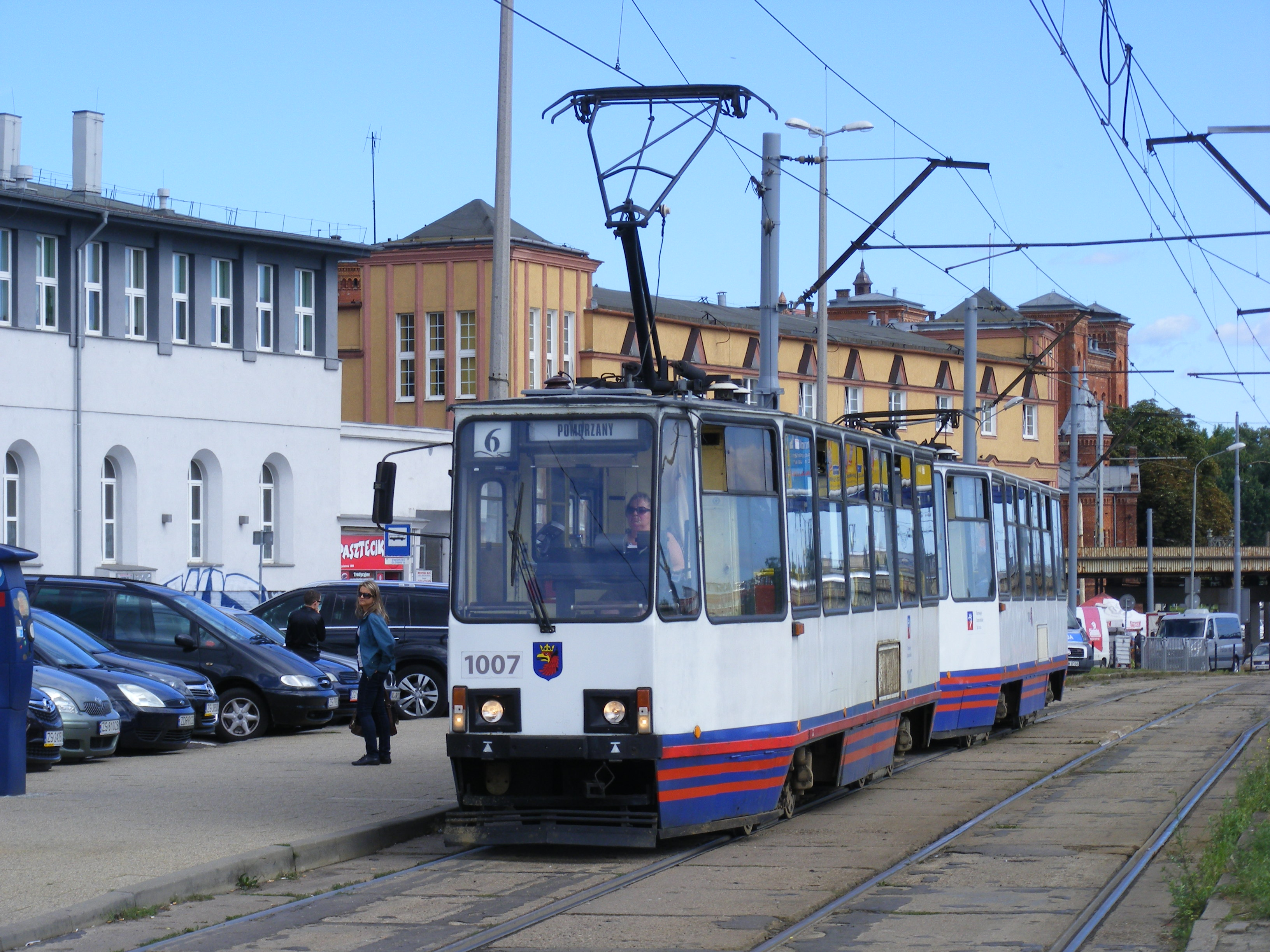 Szczecin